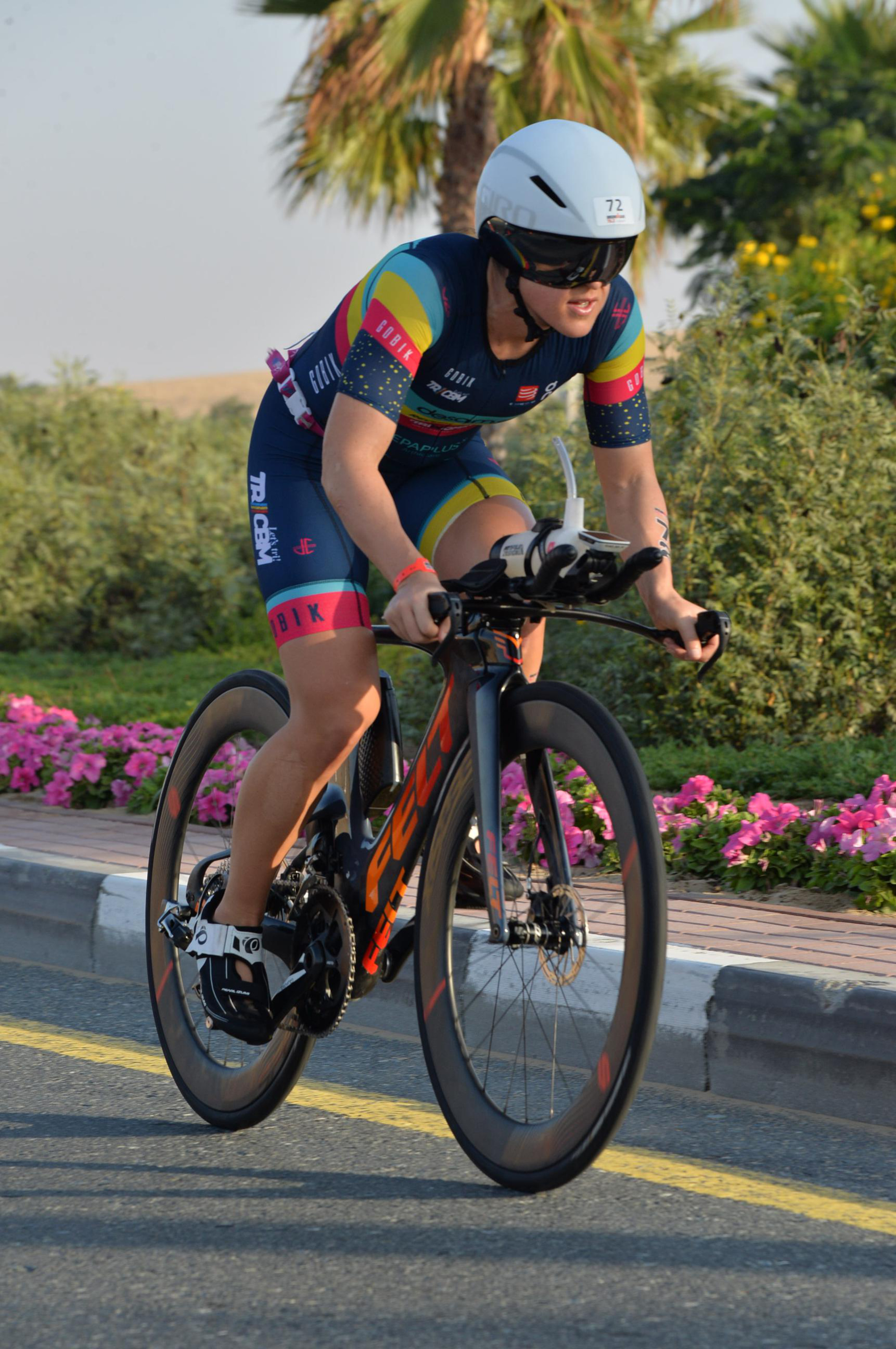 Foto 703 Dubai 2019